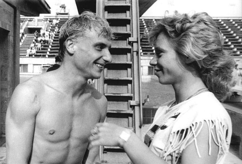 Holger Winskowski ADN-ZB Gahlbeck 5.8.88 Leipzig: 39. DDR-Meisterschaften der Wasserspringer- Der Favorit der Herrenkonkurrenz Holger Winskowski (TSC Berlin) sicherte sich im Kunstspringen mit 610,05 Punkten seinen fünften Titel seit 1983 und den viertel in Reihenfolge.